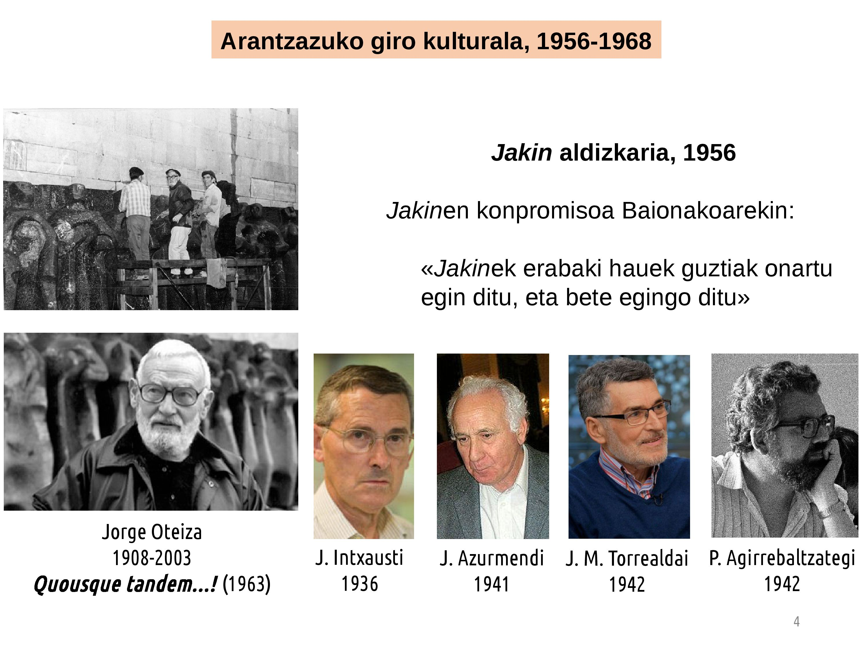 Arantzazuko giro kulturala, 1956-1968. Euskara Batuaren helduaroa Jardunaldiaren barruan (Gasteiz, 2018-06-21). Jose Ramon Etxebarriak bere hitzaldian euskarazko testugintzan bere helburuak, lanak eta bidelagunak aipatu zituen (Euskarazko testugintza. Amaitu gabeko historiaren atal baten bertsio pertsonala).